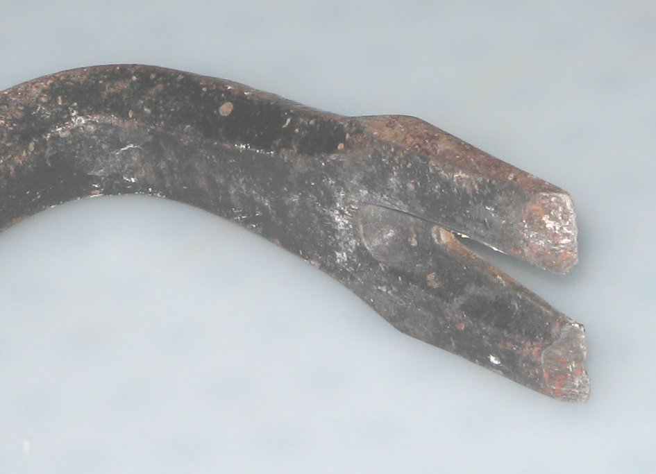 Fino de rompbaskulo kun distrancxajxo por eligi najlojn La foto estis farita de mi mem.